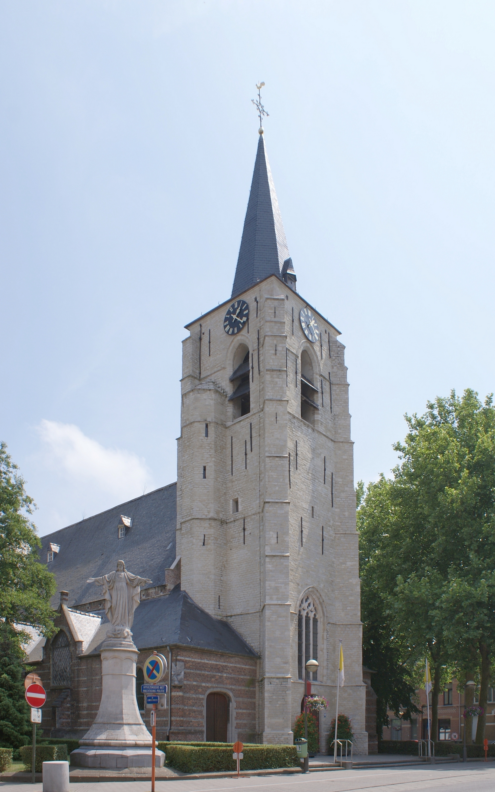 Parochiekerk Sint-Benedictus (Mortsel)